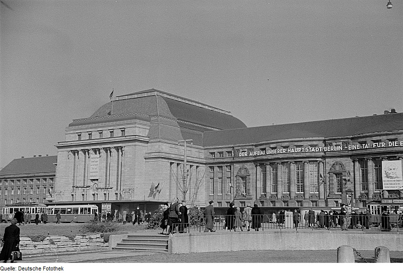 Original image description from the Deutsche Fotothek Vorderansicht des Hauptbahnhofs